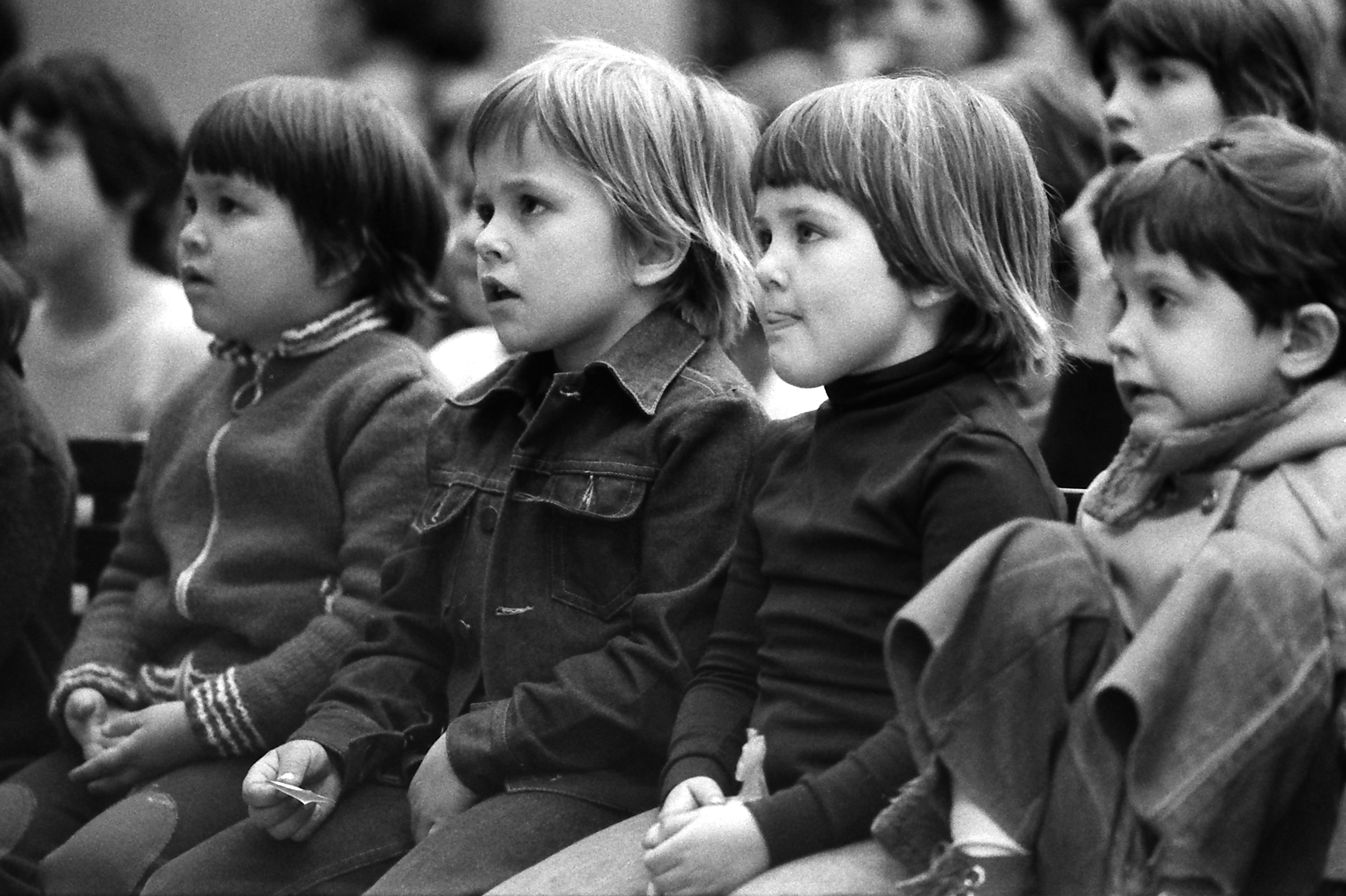 Devant le guignol, Parc Montsouris.